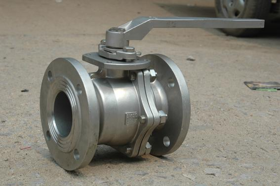 Duplex valve / ball valve.